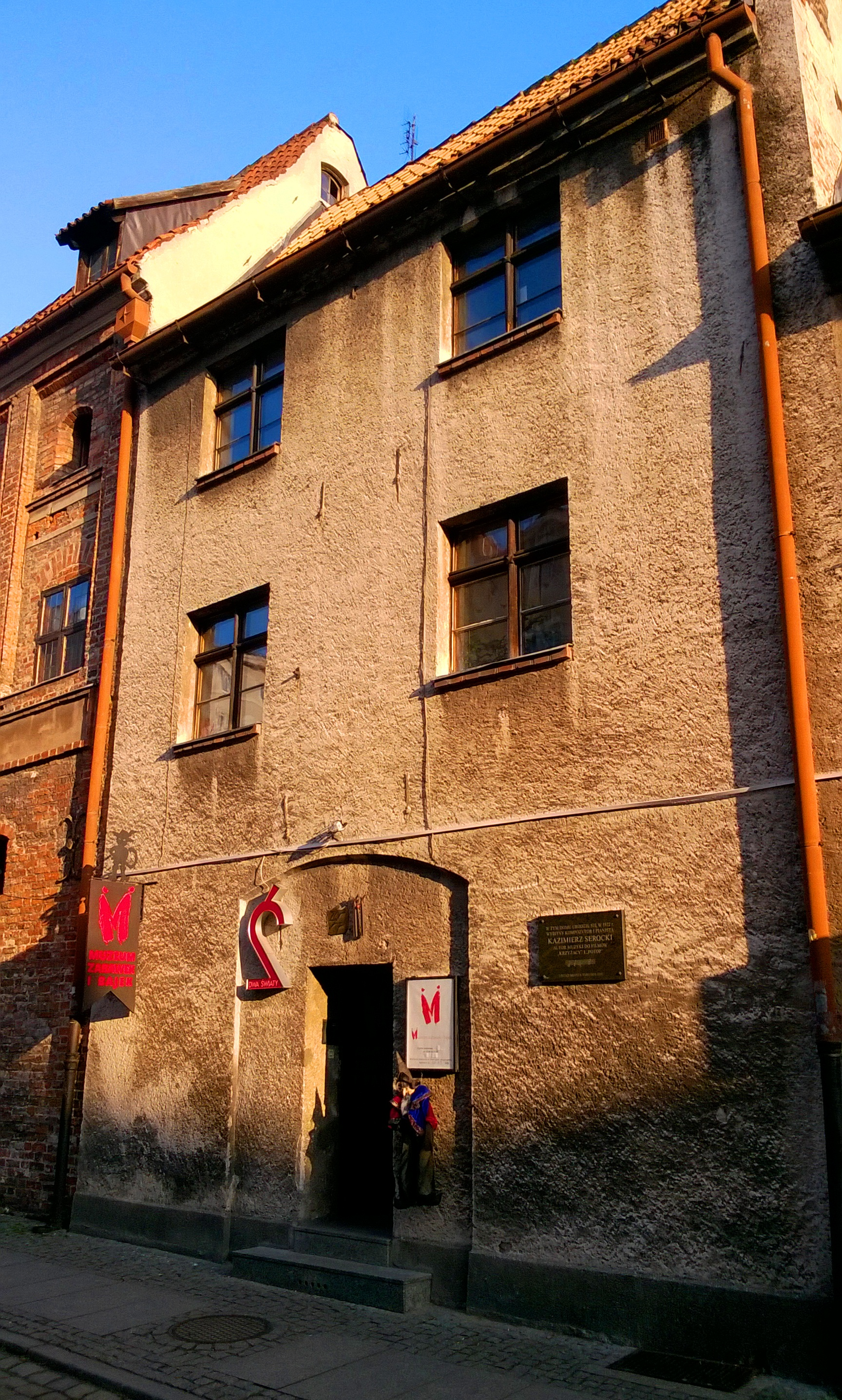 Muzeum Zabawek i Bajek w Toruniu